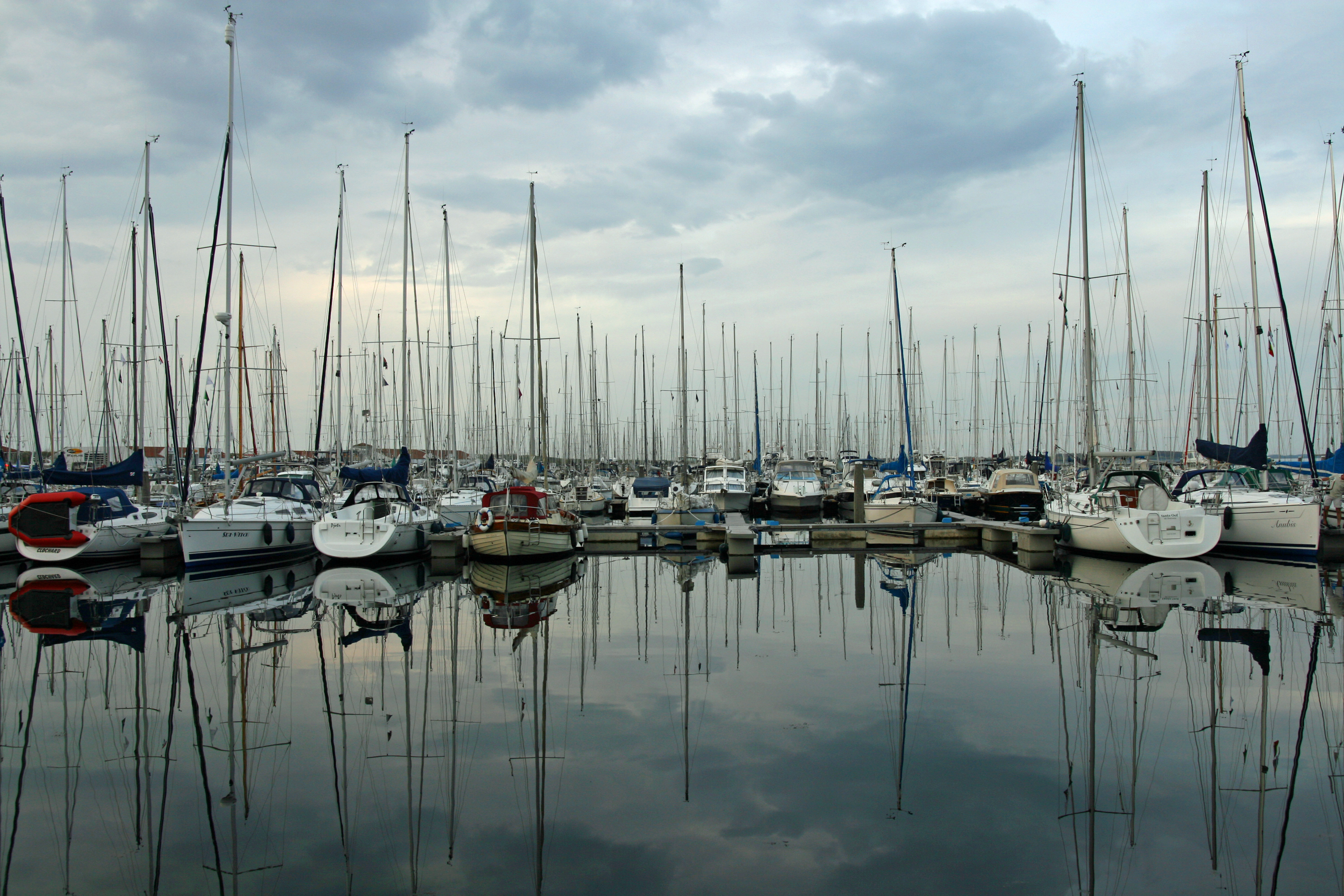 Wàt een geld ....